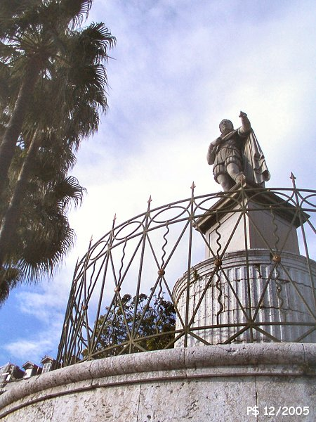 La statue de Carlo Felice (Charles Félix) au square Guynemer. Elle domine le port et regarde la mer.